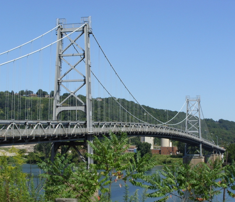 Steubenville, Ohio